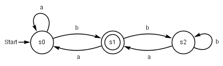 Deterministischer endlicher Automat Akzeptiert folgende Sprache (regulärer Ausdruck): a*b(a+b|b+a)*